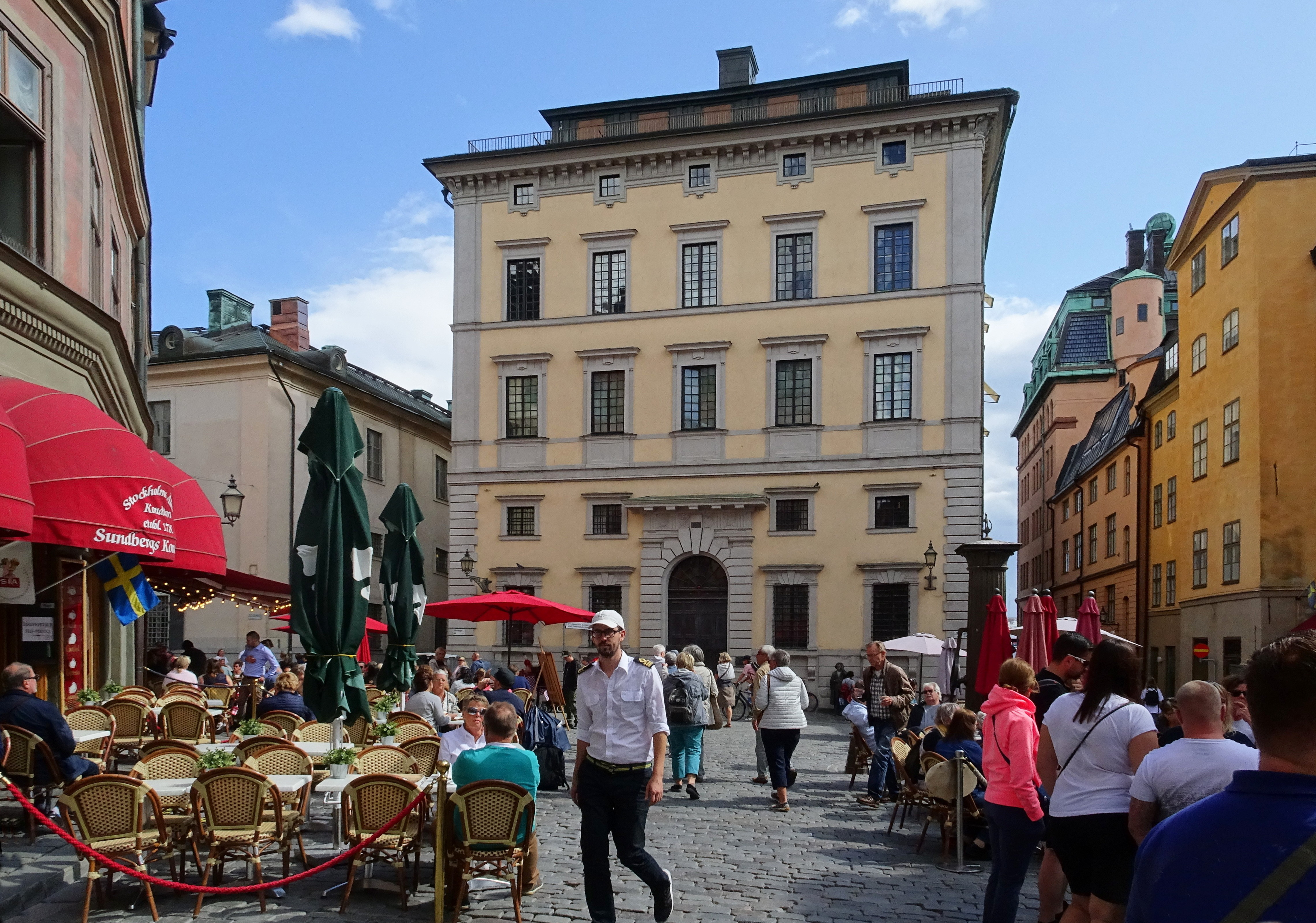 Järntorget, Stockholm med Södra Bankohuset i fonden